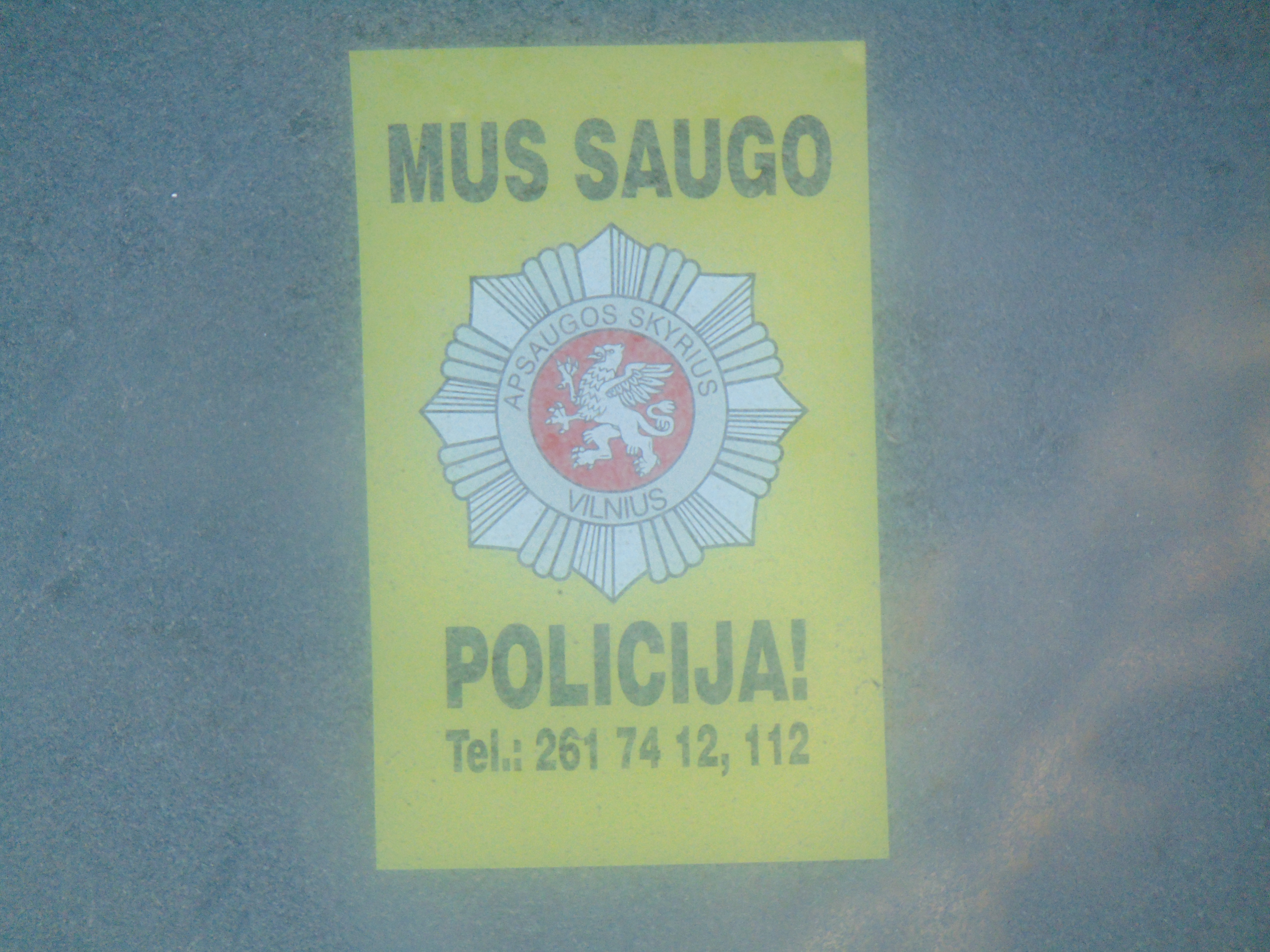 Viešosios policijos Vilniaus apsaugos skyriaus ženklas